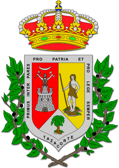 Escudo partido y mantelado. Primero, de gules, un castillo de plata, sumado del busto de un guerrero aborigen que porta en la diestra un hacha y en la siniestra una llave, el todo surmontado de un creciente de plata. Segundo, de oro, la figura de un aborigen canario al natural. Tercero, de plata, una platanera de sinople. Bordura de plata, con la leyenda Primus inter Pares pro Patria et pro Lege Semper Tazacorte en letras de sable. Al timbre, corona real cerrada. Como ornamentos exteriores, dos ramas de laurel.